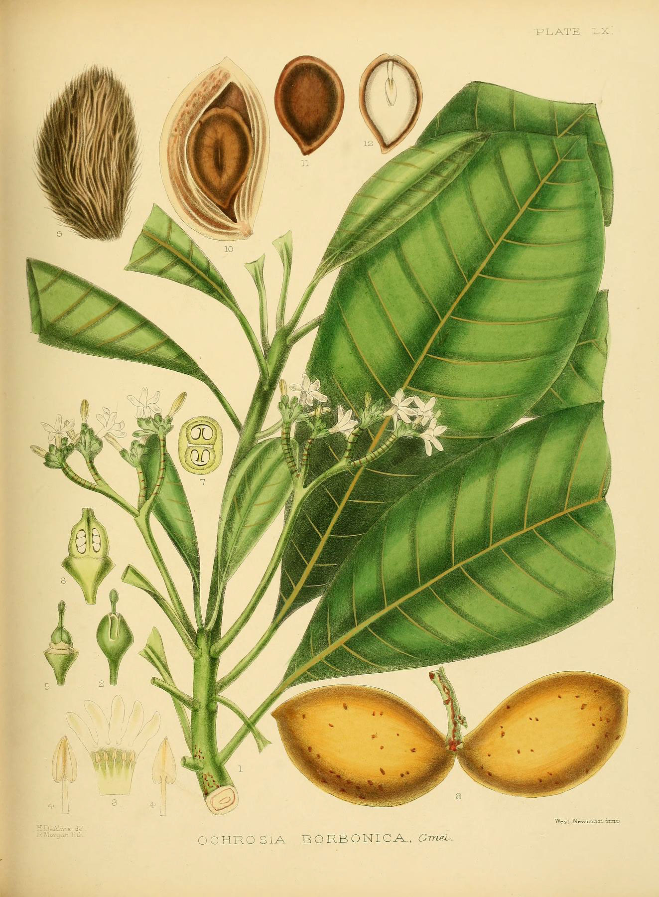 ATK LX ■■ ■■ "W»st,Kewmaji imp OCHROS1A BORBONICA, Gm«i.